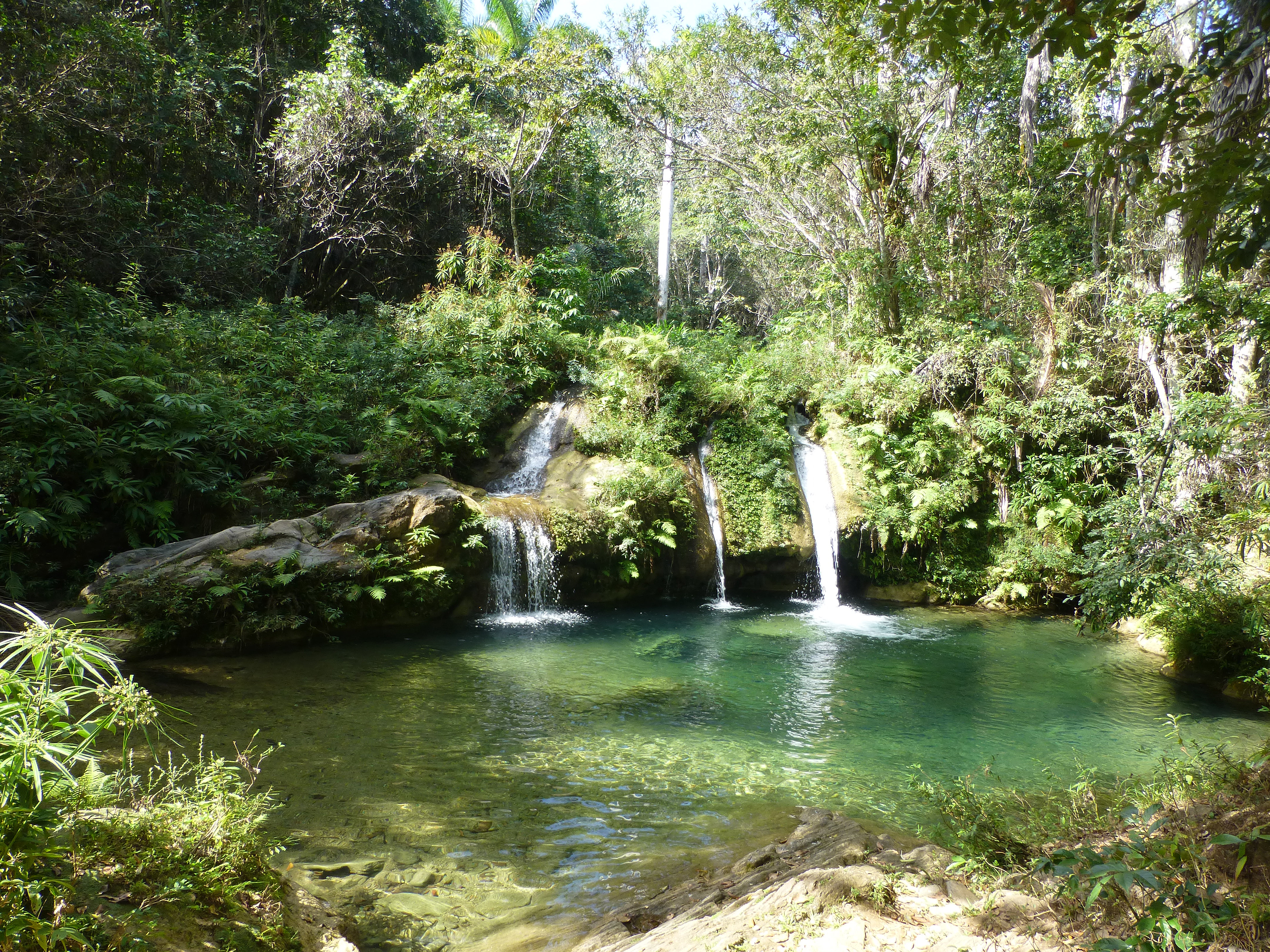 Lomas de Banao (Cuba) : cascade de Bella